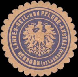 Sealing stamp Title: Landes-Heil- und Pflege-Anstalt Herborn/Dillkrei Description: orange, blau, geprägt Place: Herborn size: 4 cm